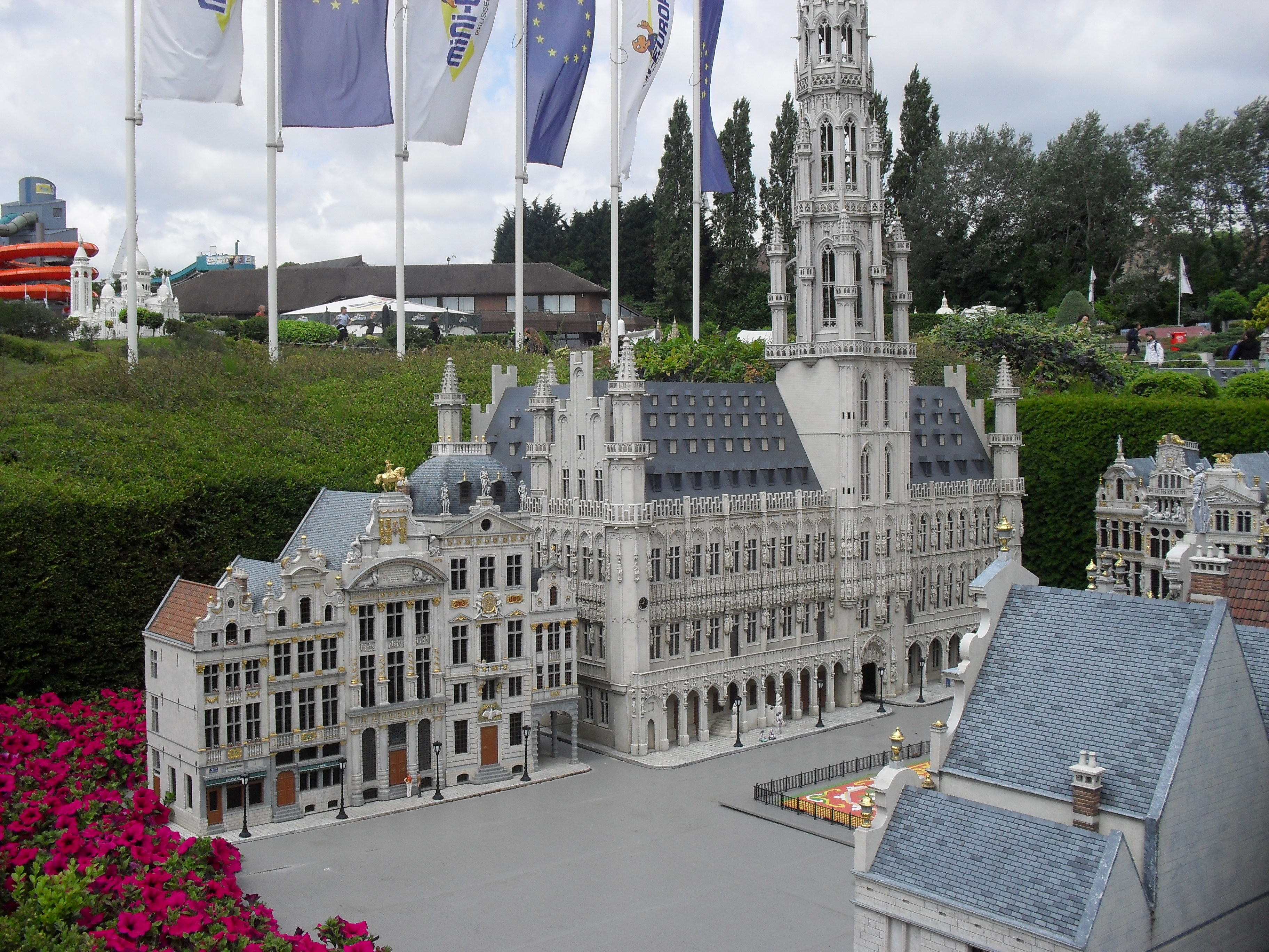 Hôtel de Ville de Bruxelles , Mini-Europe